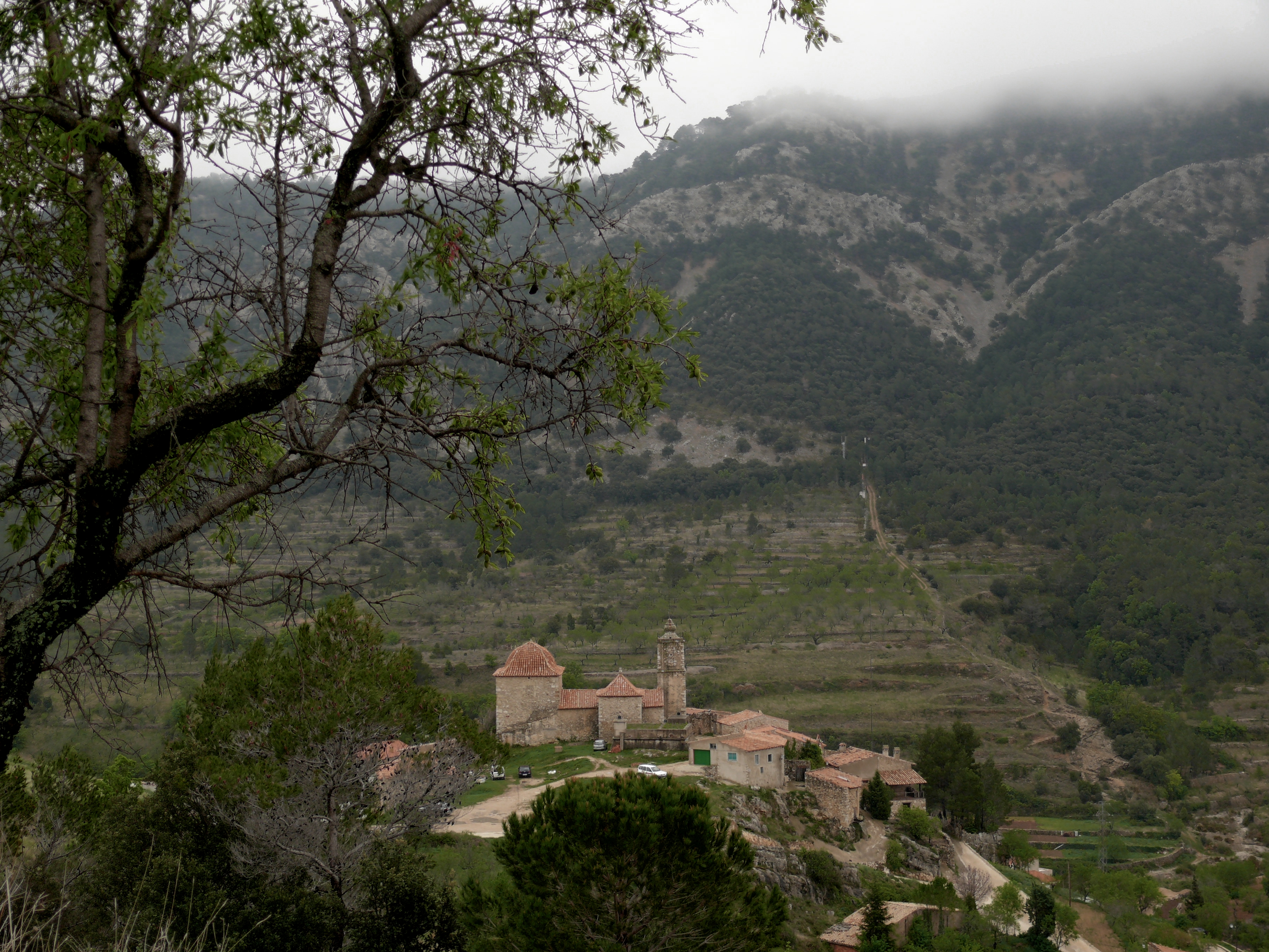 Església parroquial de l'Assumpció (la Pobla de Benifassà) 03.093-006.